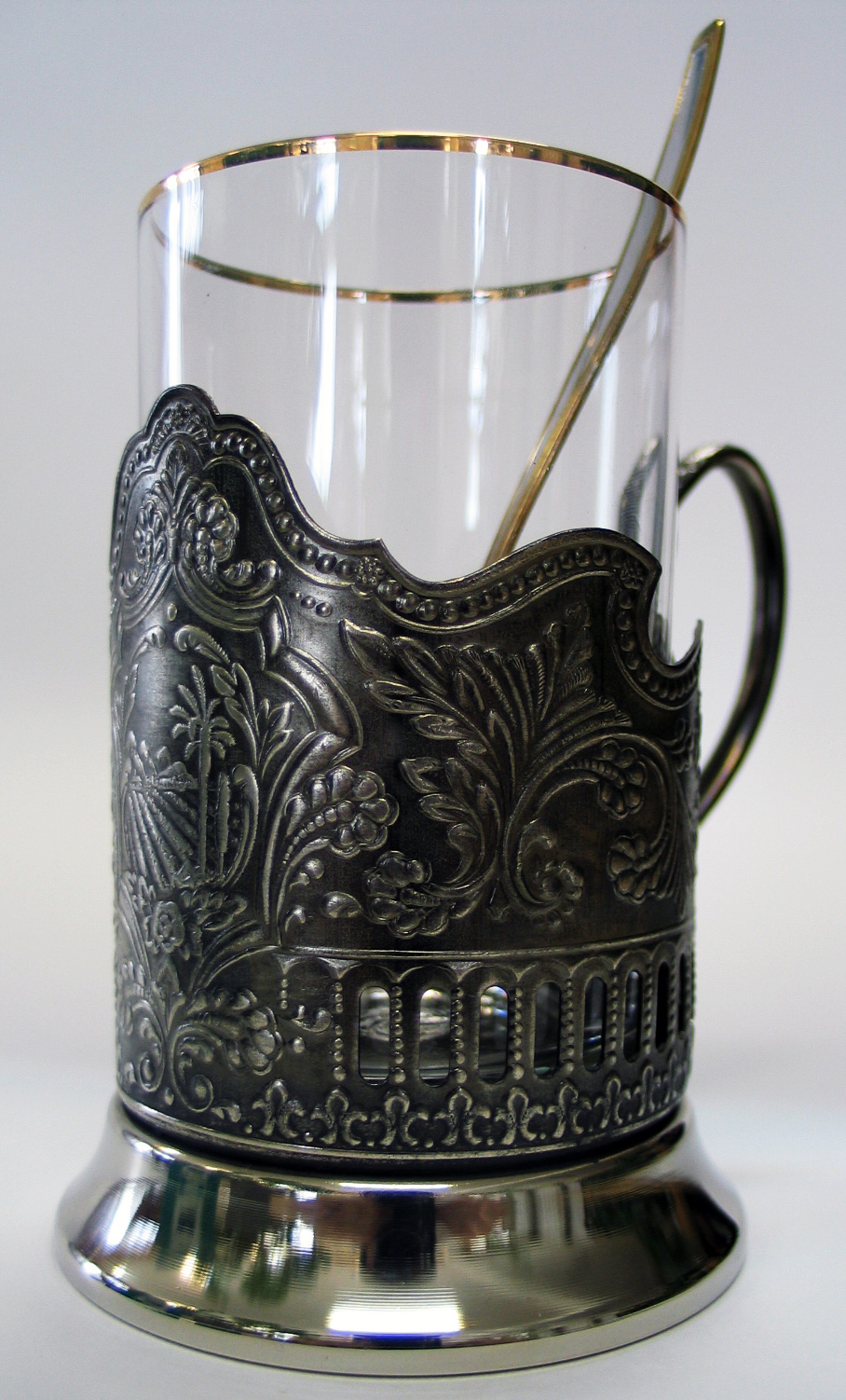 Подстаканник кольчугинский классический «Пальма»